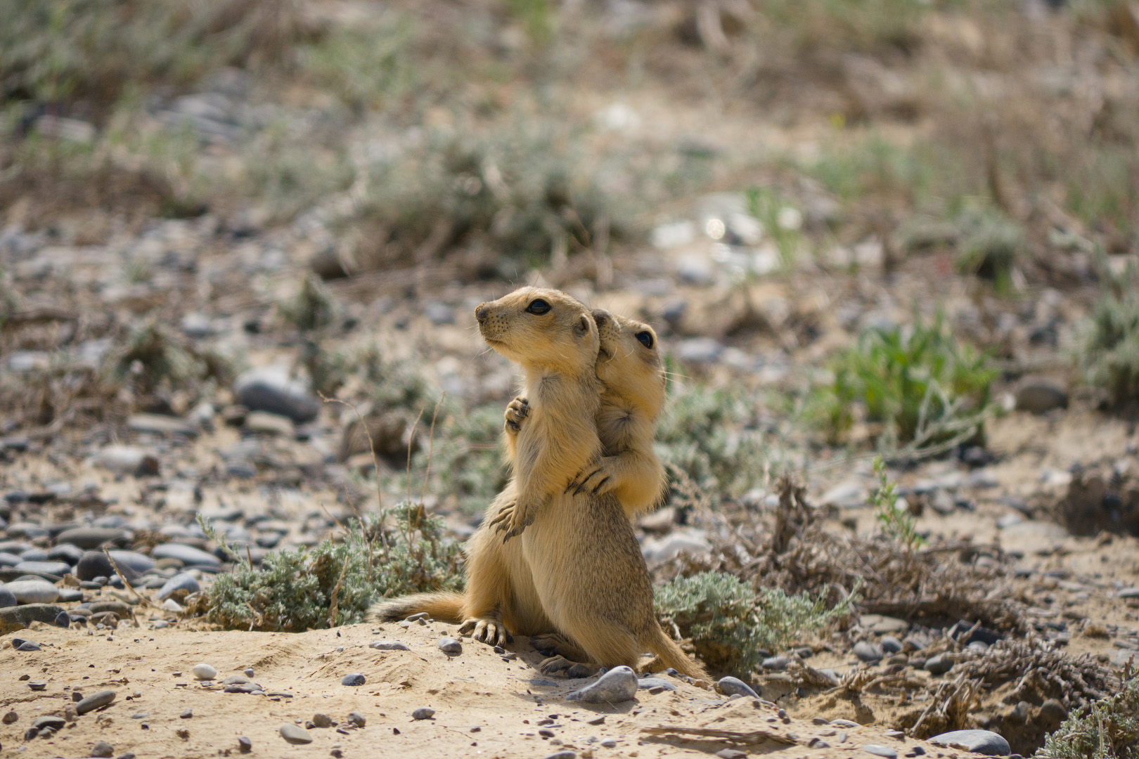 Детеныши желтого суслика играют